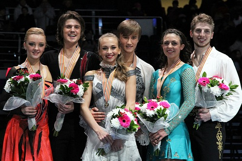 Подиум в танцах на льду на чемпионате мира по фигурному катанию среди юниоров 2012